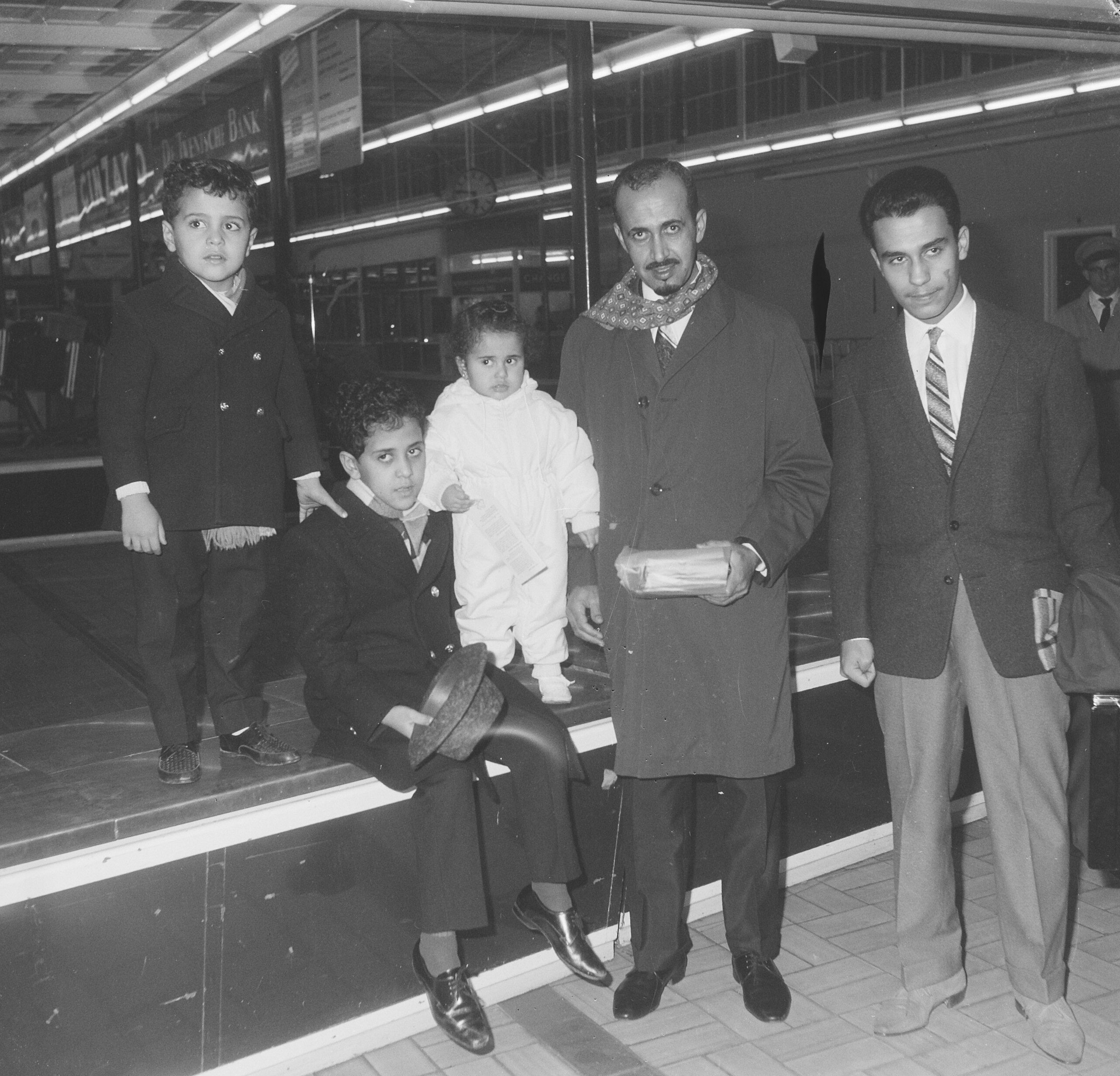 Collectie / Archief : Fotocollectie Anefo Reportage / Serie : [ onbekend ] Beschrijving : Prins Addulah Ben Mohammed al Saoed op Schiphol. Poseert met zijn gezin. Zoons prins Turki, Bandar en Fahd (oudste zoon) en dochter Norah Annotatie : Prinses Norah was in Engeland geopereerd aan haar benen Datum : 9 november 1961 Locatie : Noord-Holland, Schiphol Trefwoorden : BROERS, Kinderen, prinsen Persoonsnaam : Abdullah bin Abdul Aziz Al Saud, prins van Saudi-Arabië Fotograaf : Pot, Harry / Anefo Auteursrechthebbende : Nationaal Archief Materiaalsoort : Negatief (zwart/wit) Nummer archiefinventaris : bekijk toegang 2.24.01.03 Bestanddeelnummer : 913-1631